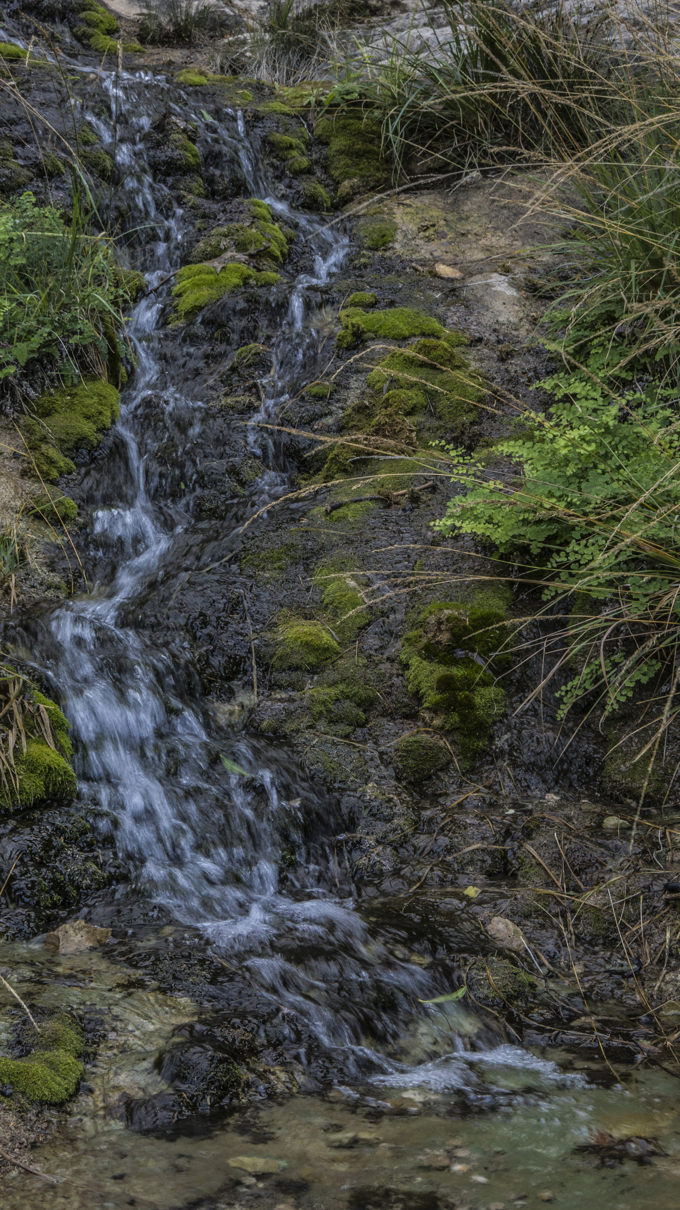 La font el Chorrico està situada al terme de Tous (Barranc del Castellet)